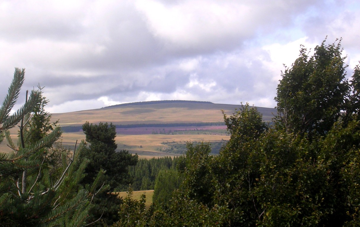 Le Signal du Luguet vu depuis les brèches de Jignol - Cézallier - 15 - France